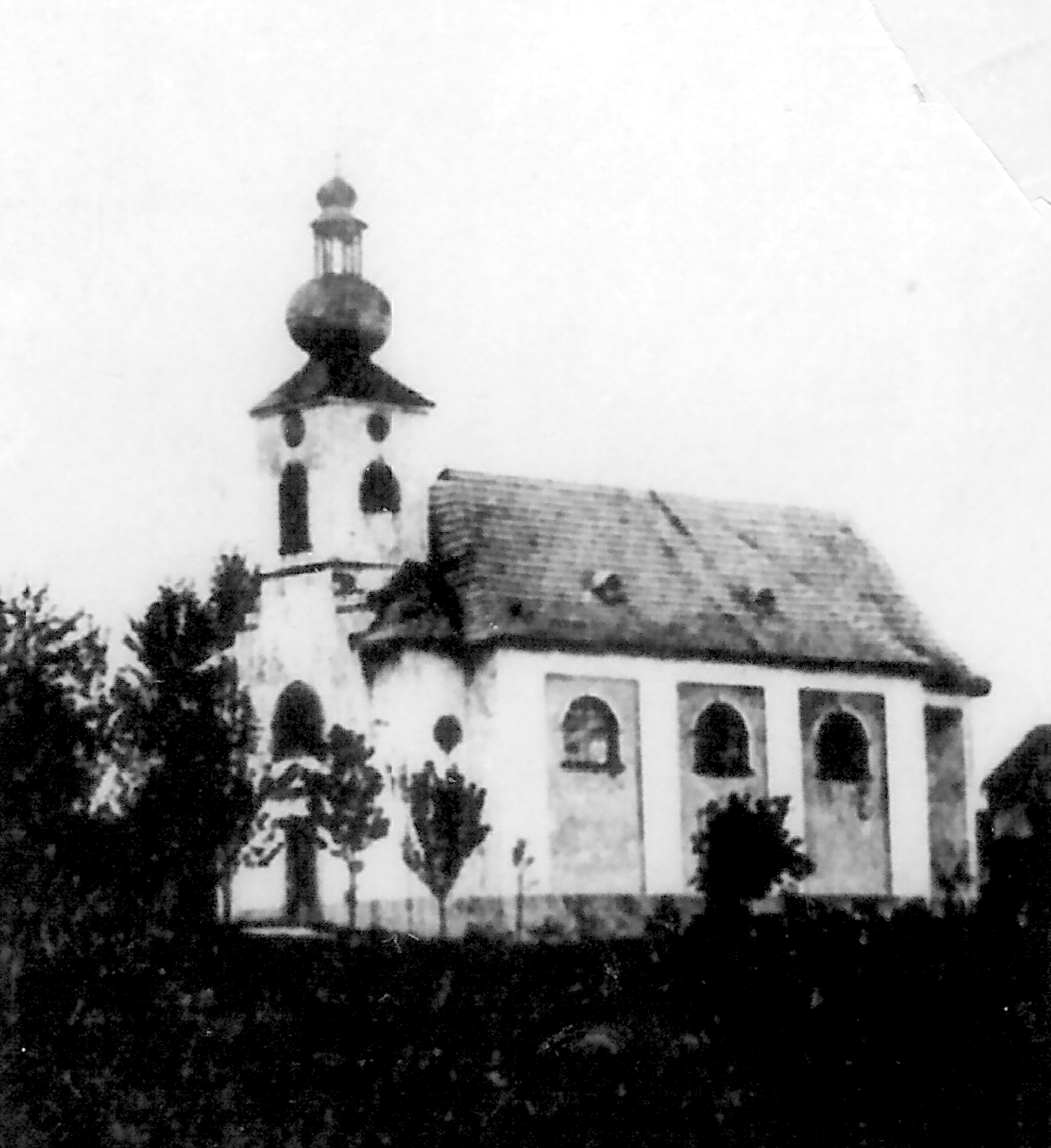 Pfarrkirche St. Antonius von Padua in Hirschenstand Außenansicht